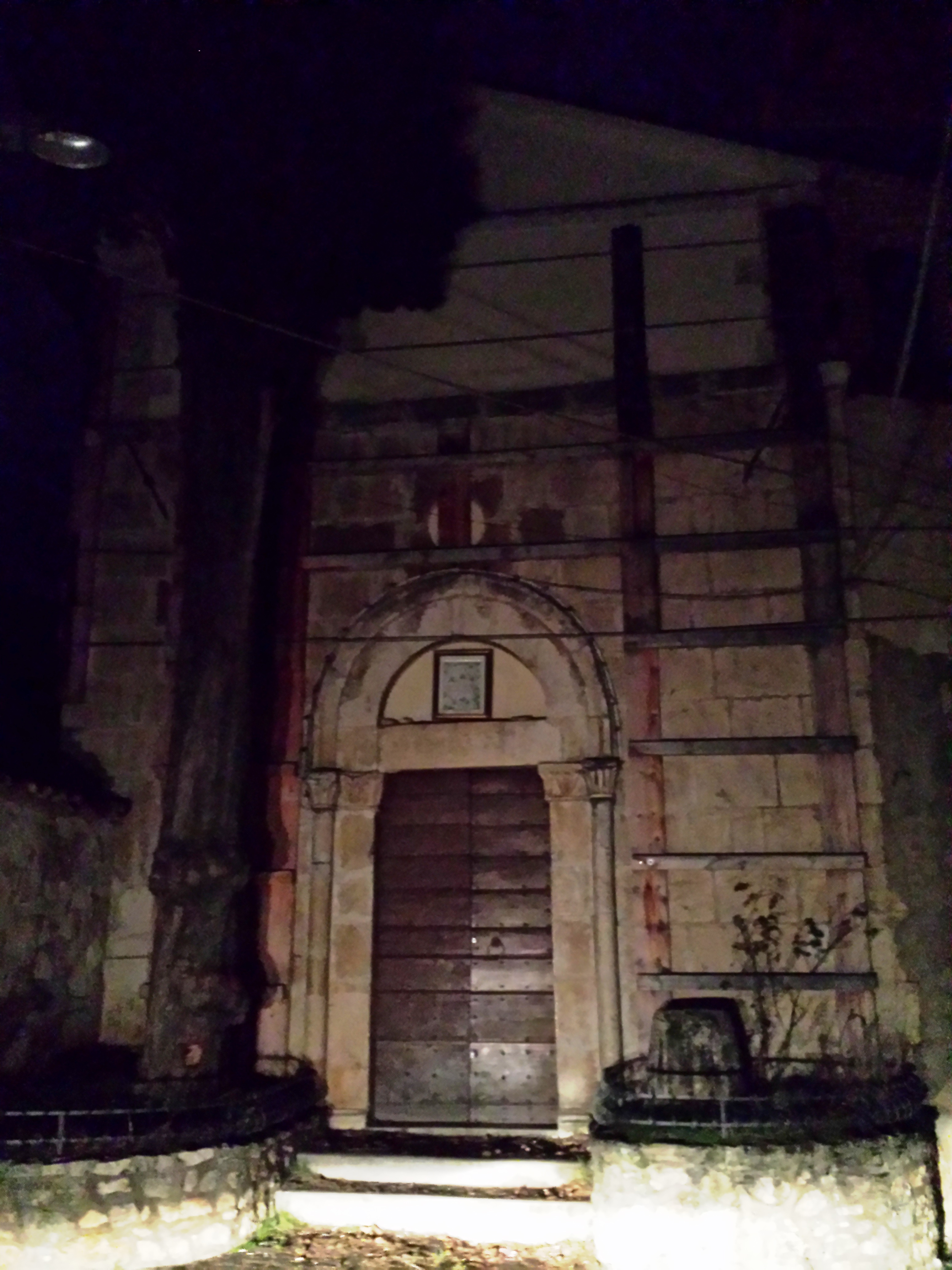 Chiesa di Sant'Eugenia, Collefracido (L'Aquila)